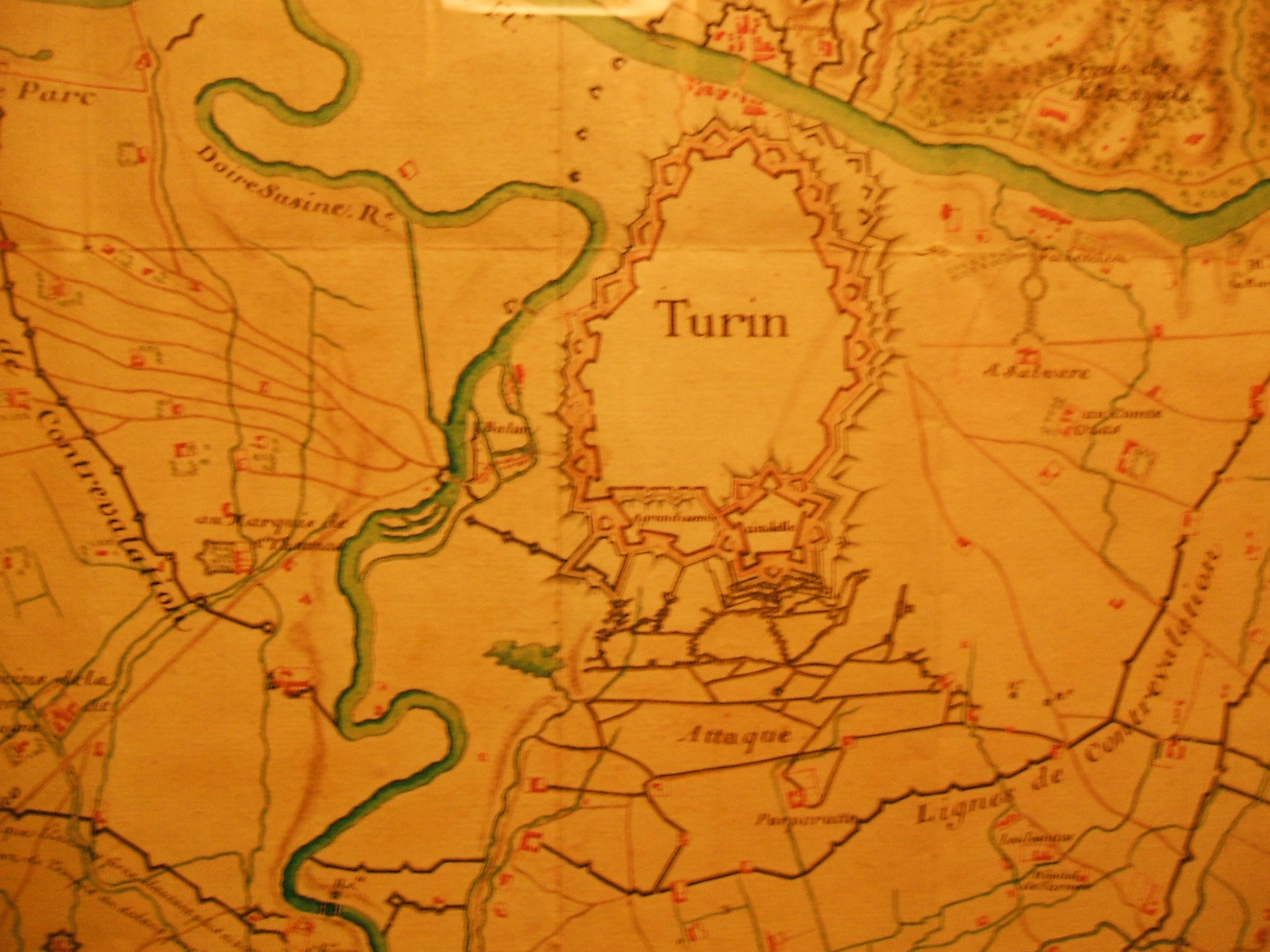 Mappa del progetto dell'assedio di Torino del 1706.